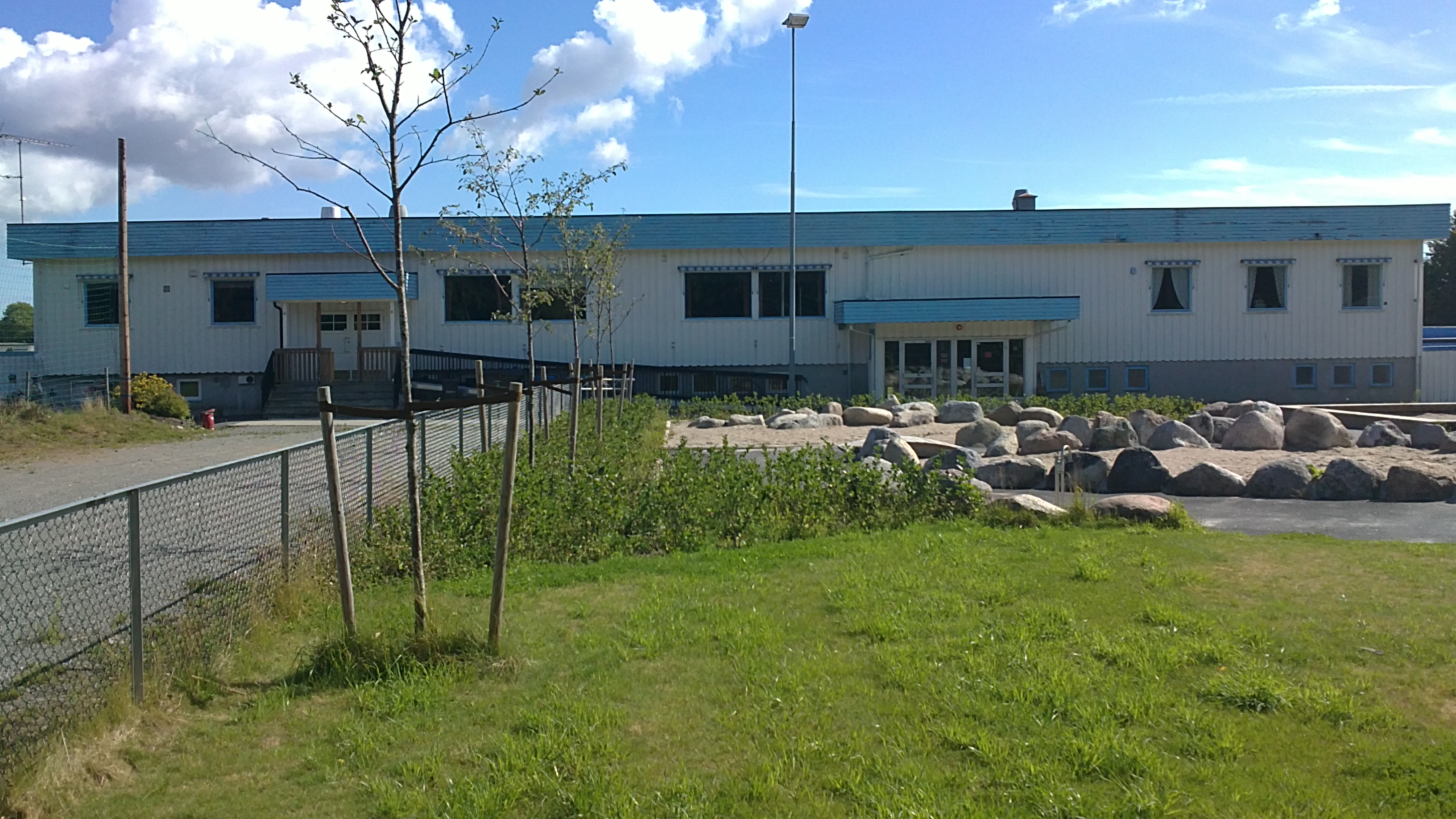 Bilde av Larvik Turns klubbhytte